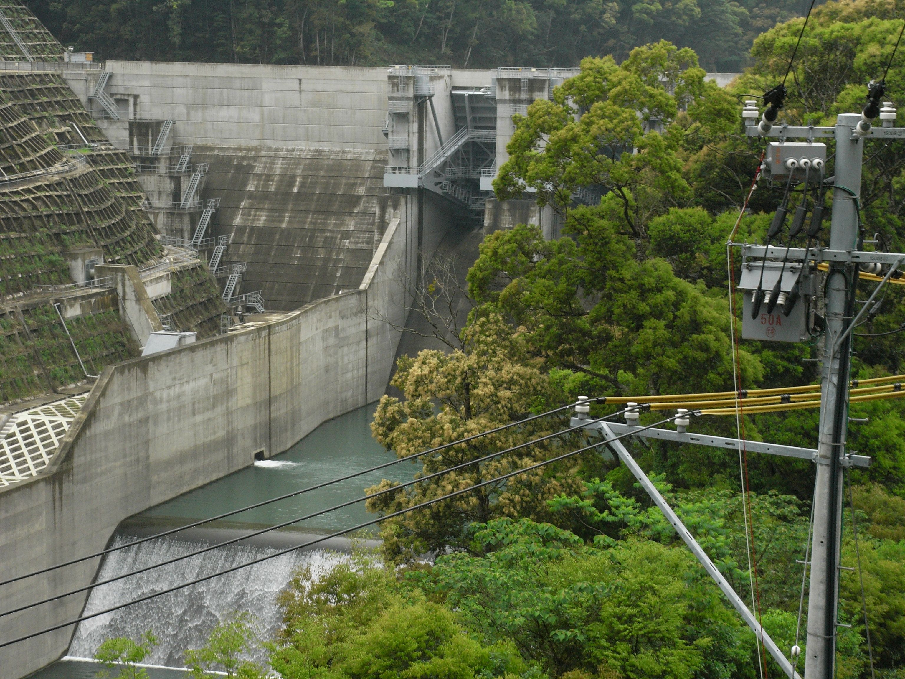 Dam